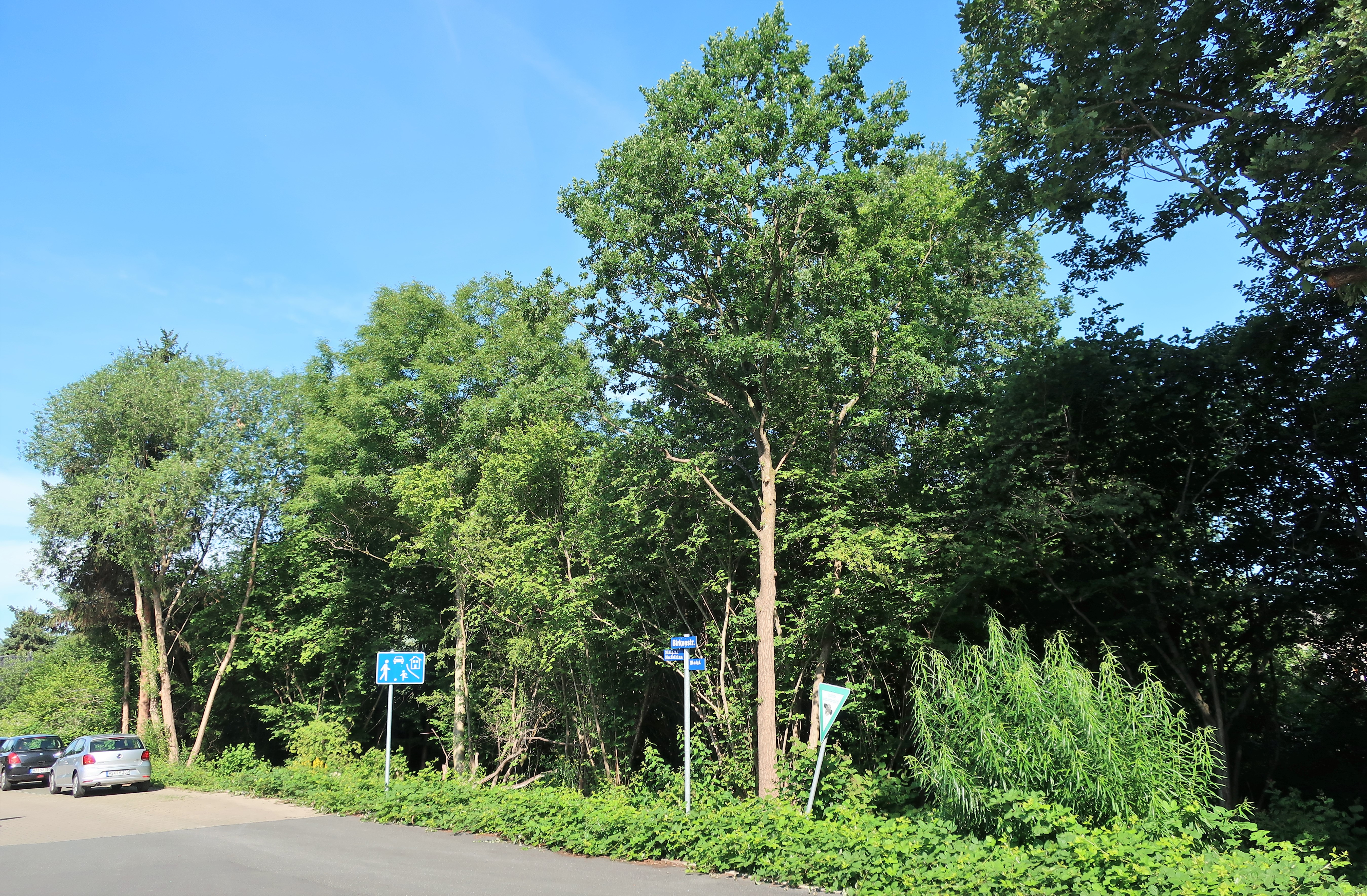 Geschützter Landschaftsbestandteil 1.4.2.11 „Birkenbach“ in Hagen-Boelerheide, zwischen Hügelstraße und Birkenstraße. Es handelt sich um einen Bachlauf mit zum Teil naturnahem, artenreichen Ufergehölz und Krautsäumen. Das Schutzgebiet umfaßt auch eine Wiese mit Quellbereichen und Teile der angrenzenden öffentlichen und privaten Grünflächen.